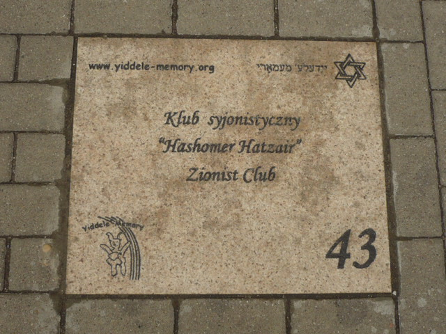 Radomsko. Otwarte Muzeum Żydowskie 43